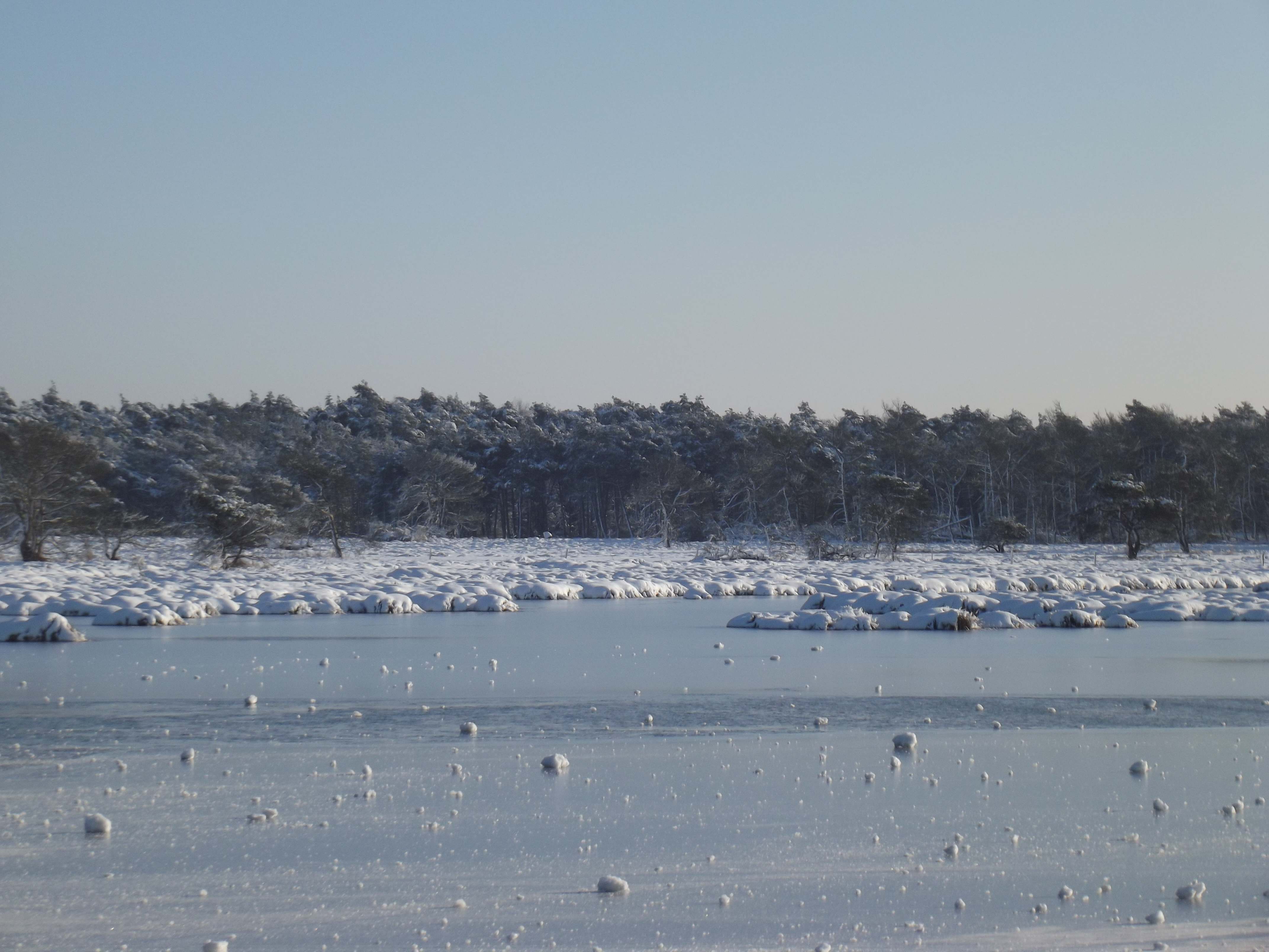 Uitzicht over bevroren en besneeuwde plassen